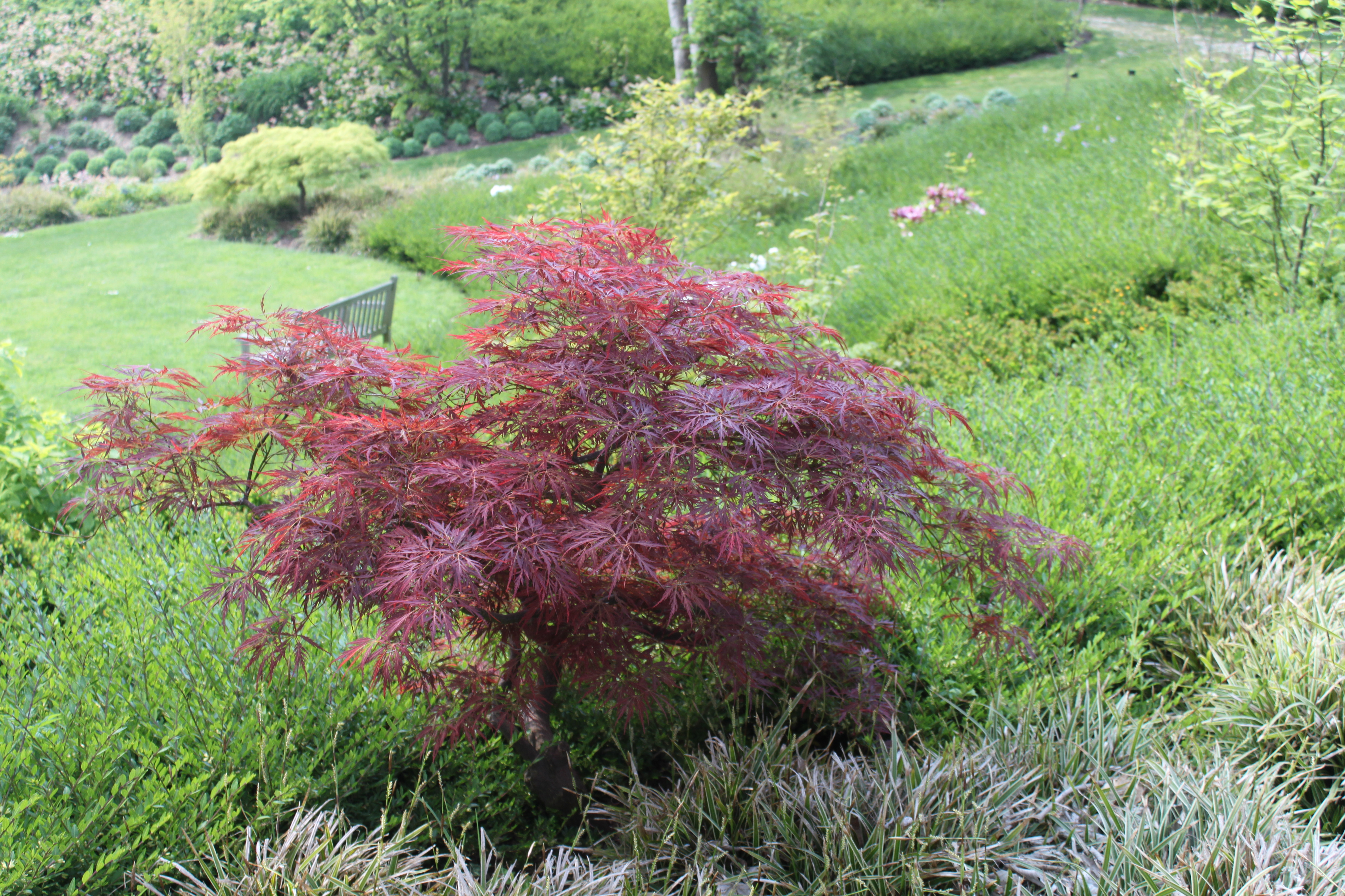 érable du japon au jardins suspendus le havre